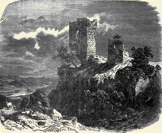 Csicsó vára